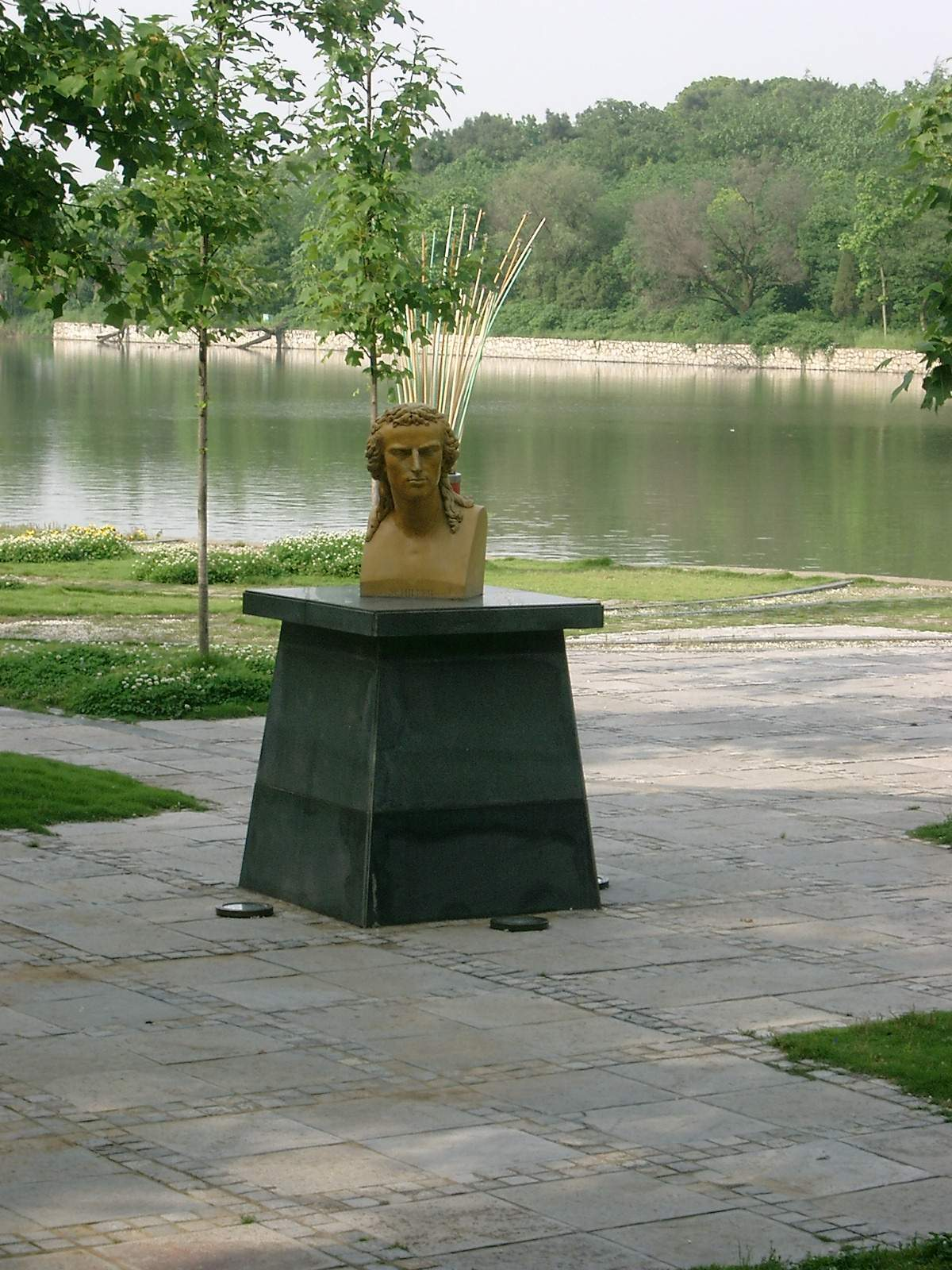 Schillerdenkmal am Tianjinghu-See in Tongling